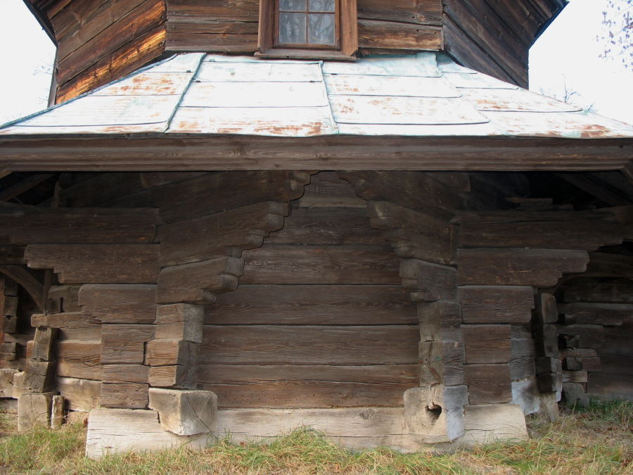 Leżachów (Poland), Greek Catholic church